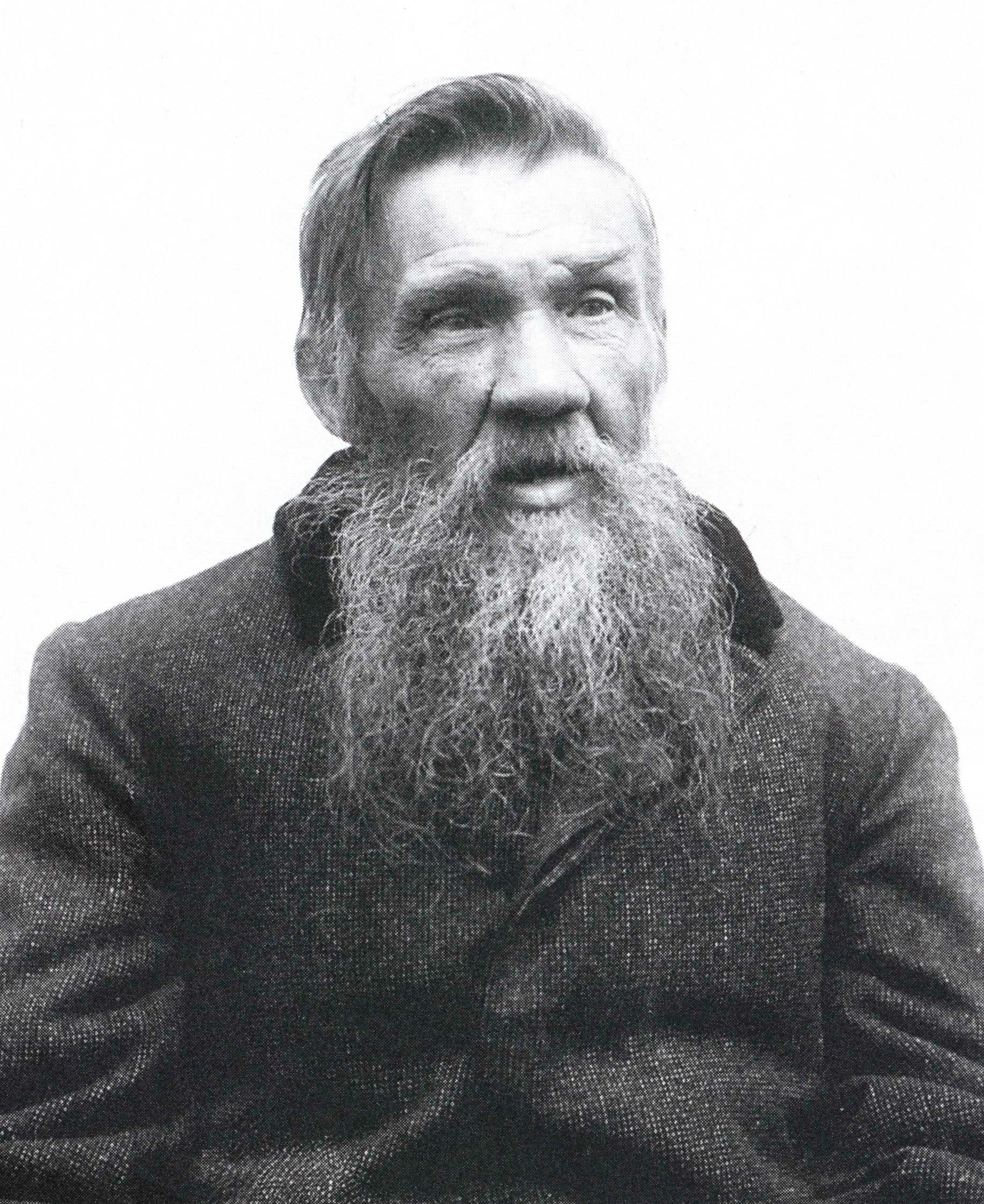 Каринский Михаил Иванович, 1910-е годы